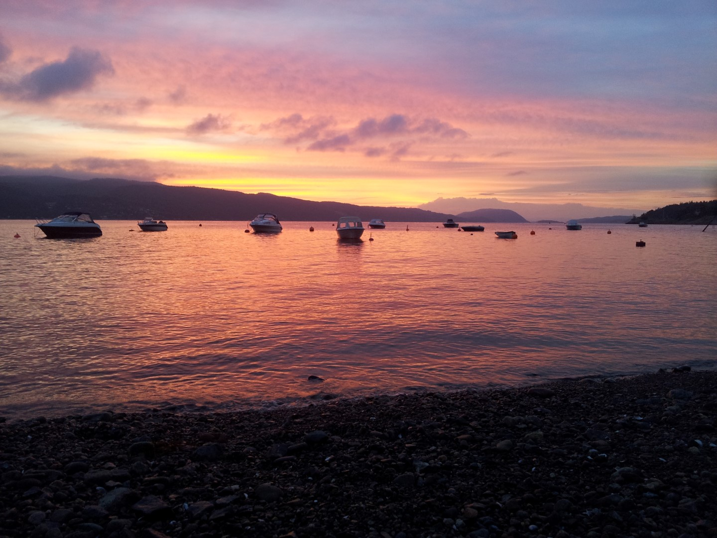 Utsikt utover Oslofjorden syd for Hvitsten